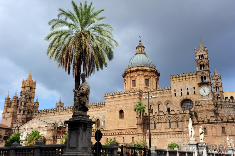 KATEDRÁLA